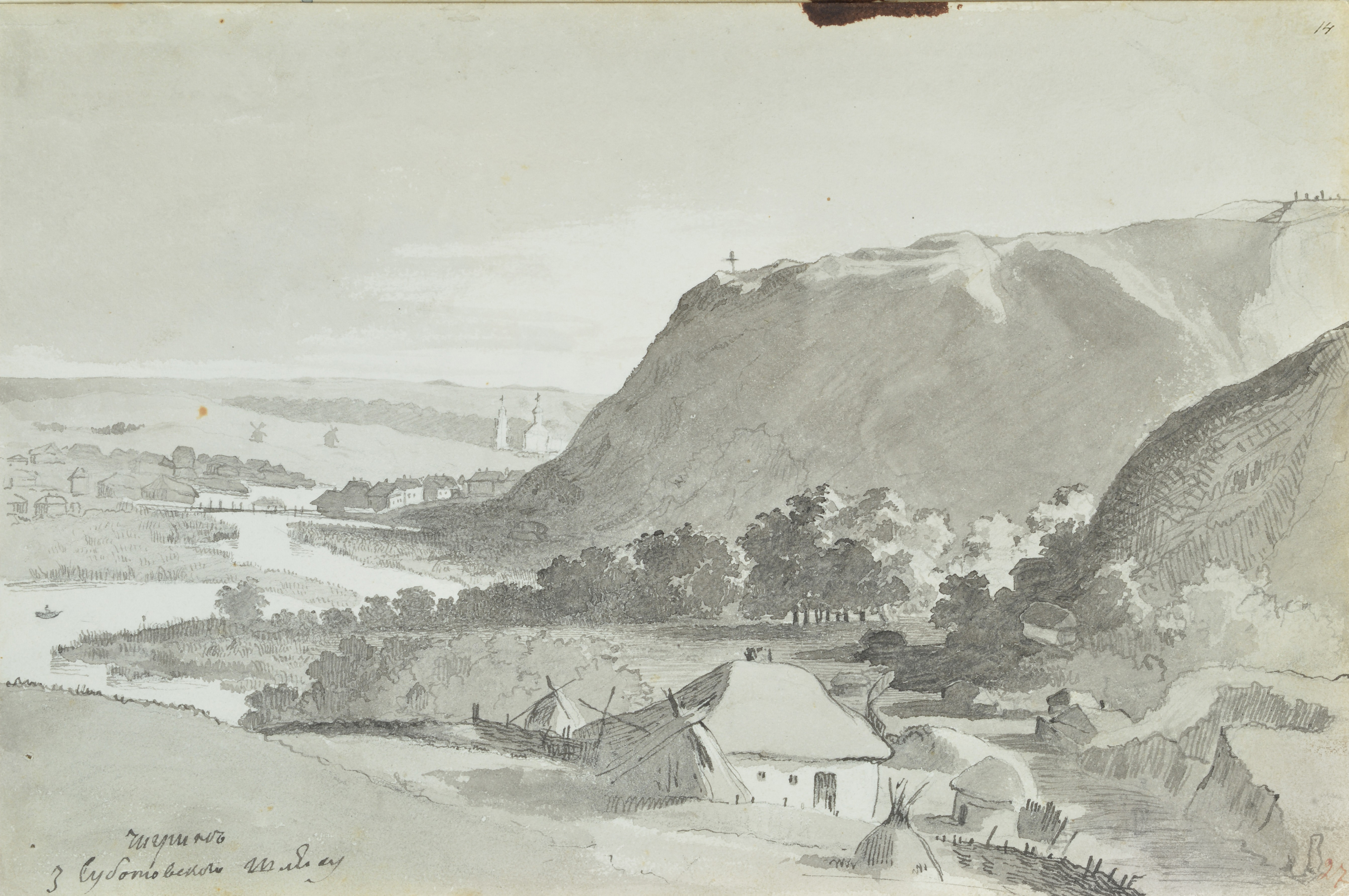 Тарас Шевченко. Альбом 1845 р. Арк. 14. Чигрин з Суботівського шляху. Вдалині — Чигринський дівочий монастир